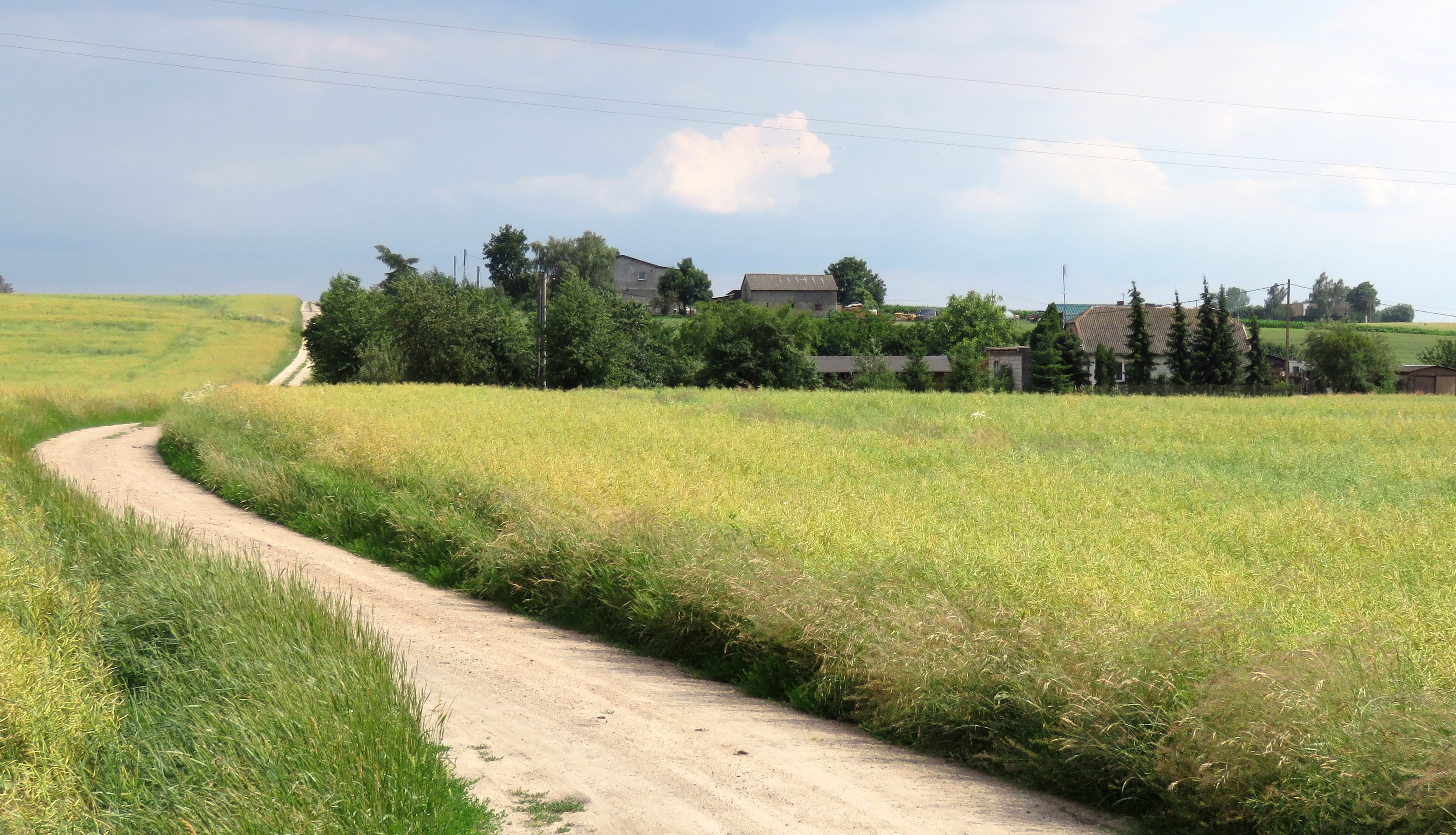 Przydatki, gmina Brodnica